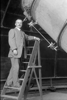 希伯·道斯特·柯蒂斯